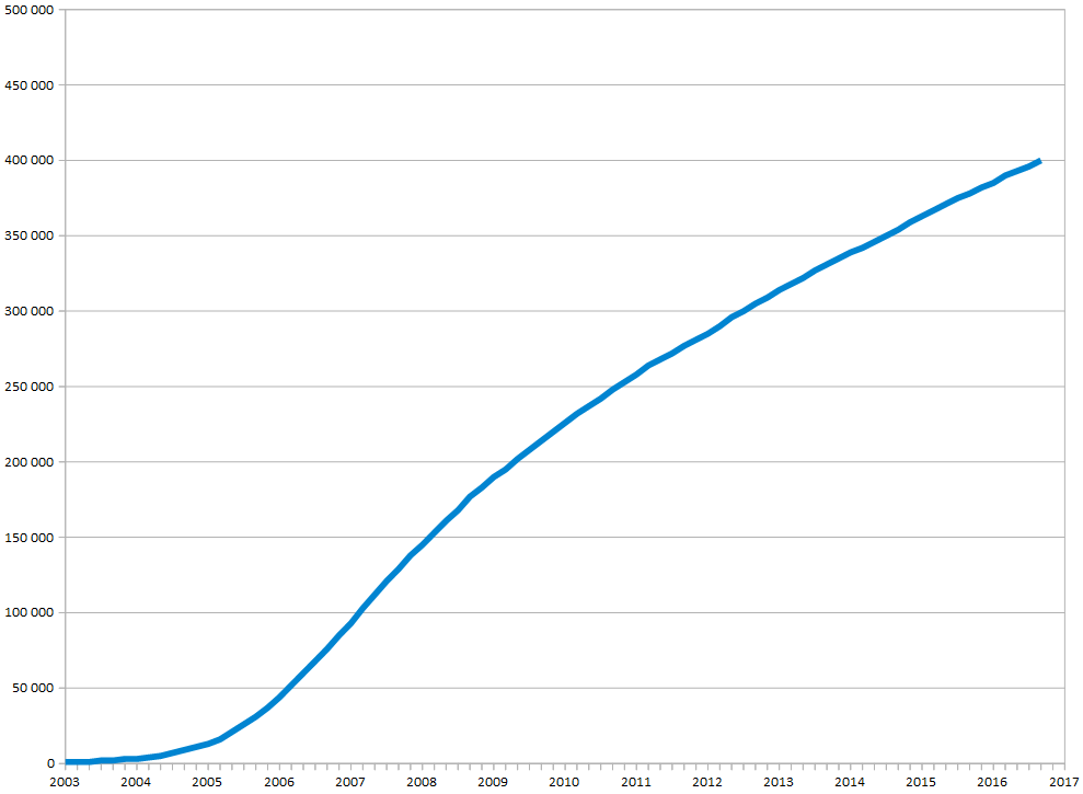 Artikkelien määrä suomenkielisessä Wikipediassa 2003-2012 kolmen kuukauden mittausvälillä ja 1000 artikkelin tarkkuudella.